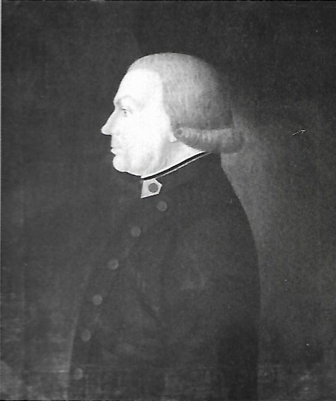 Clemens Lothar von Fürstenberg (1725-1791), Gemälde eines unbekannten Künstlers (heute auf Schloss Herdringen)